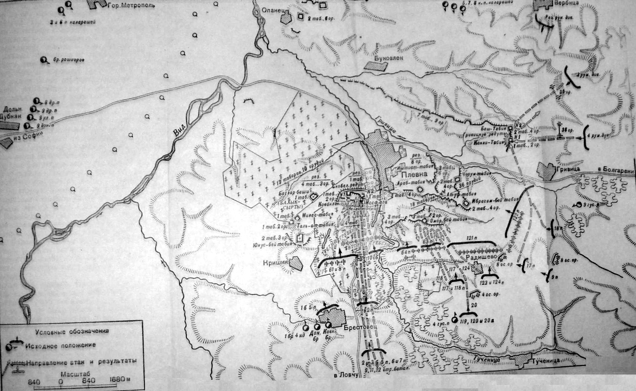 Трета атака на Плевен